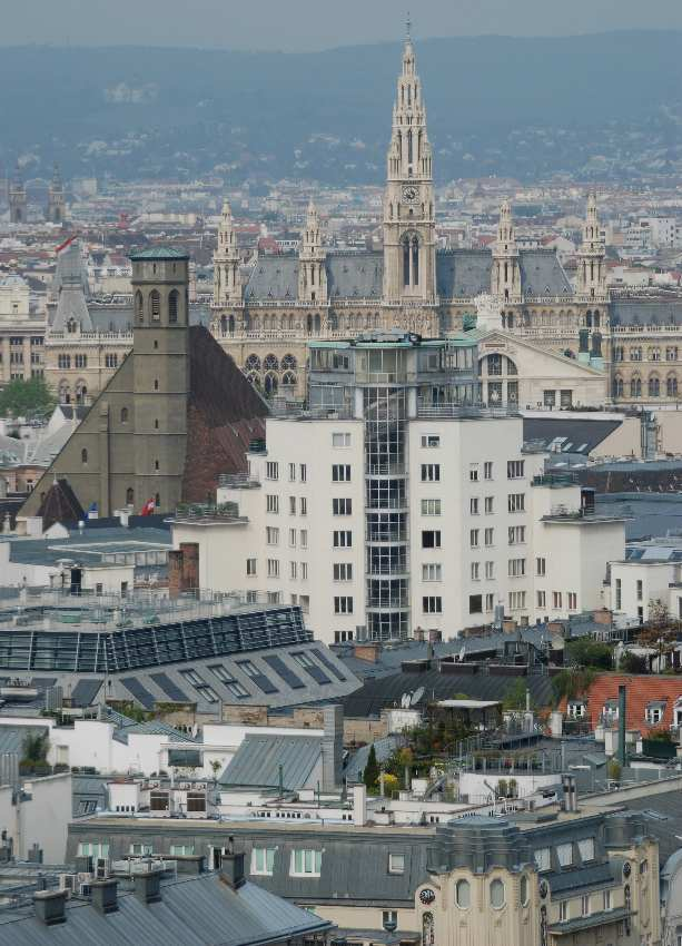 Das Hochhaus in der Herrengasse vom Stephansdom aus aufgenommen